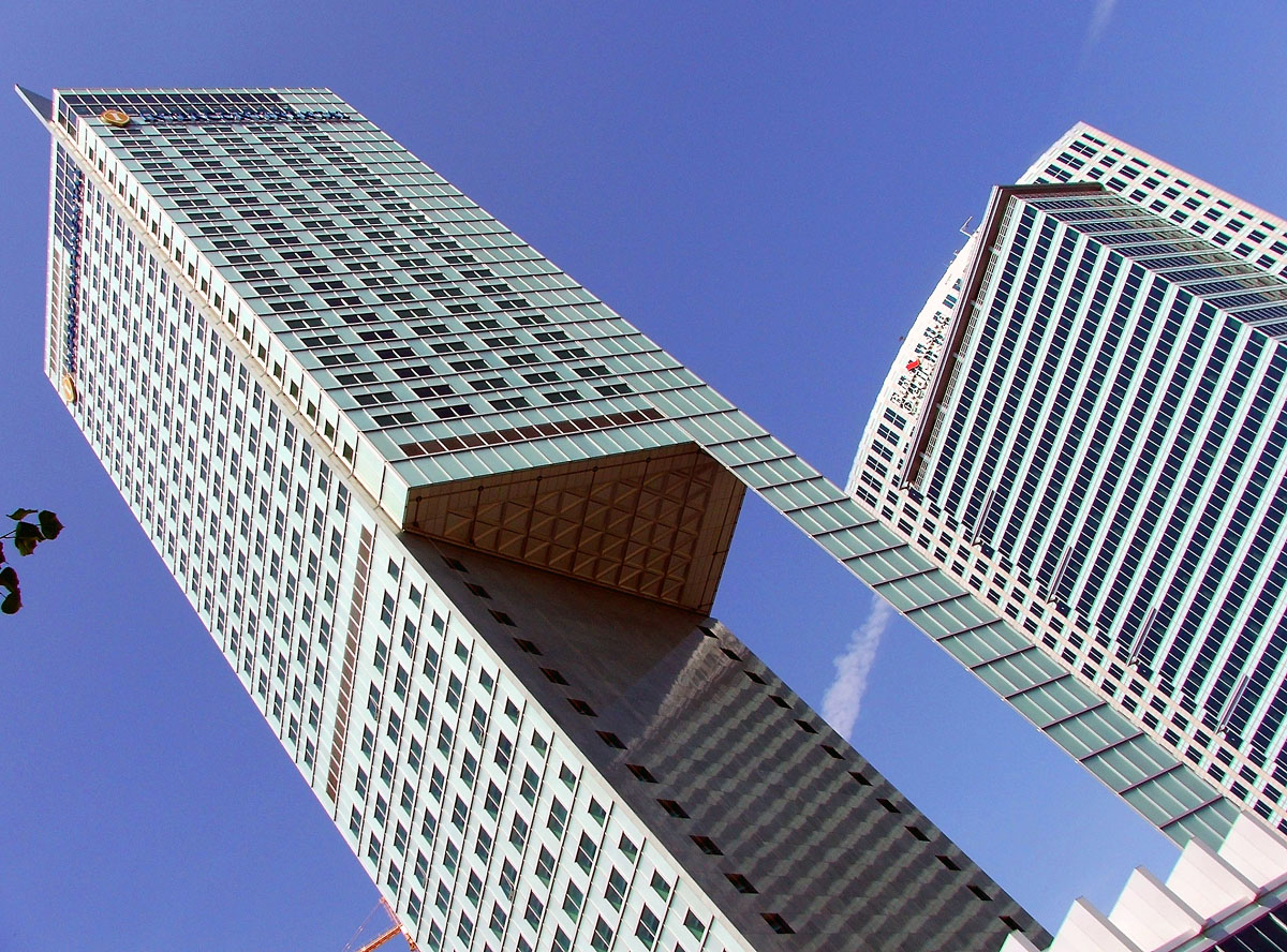 Hotel Intercontinental in Warschau-Śródmieście (Innenstadt) Author: Sebastian Maćkiewicz. Warsaw, Poland.